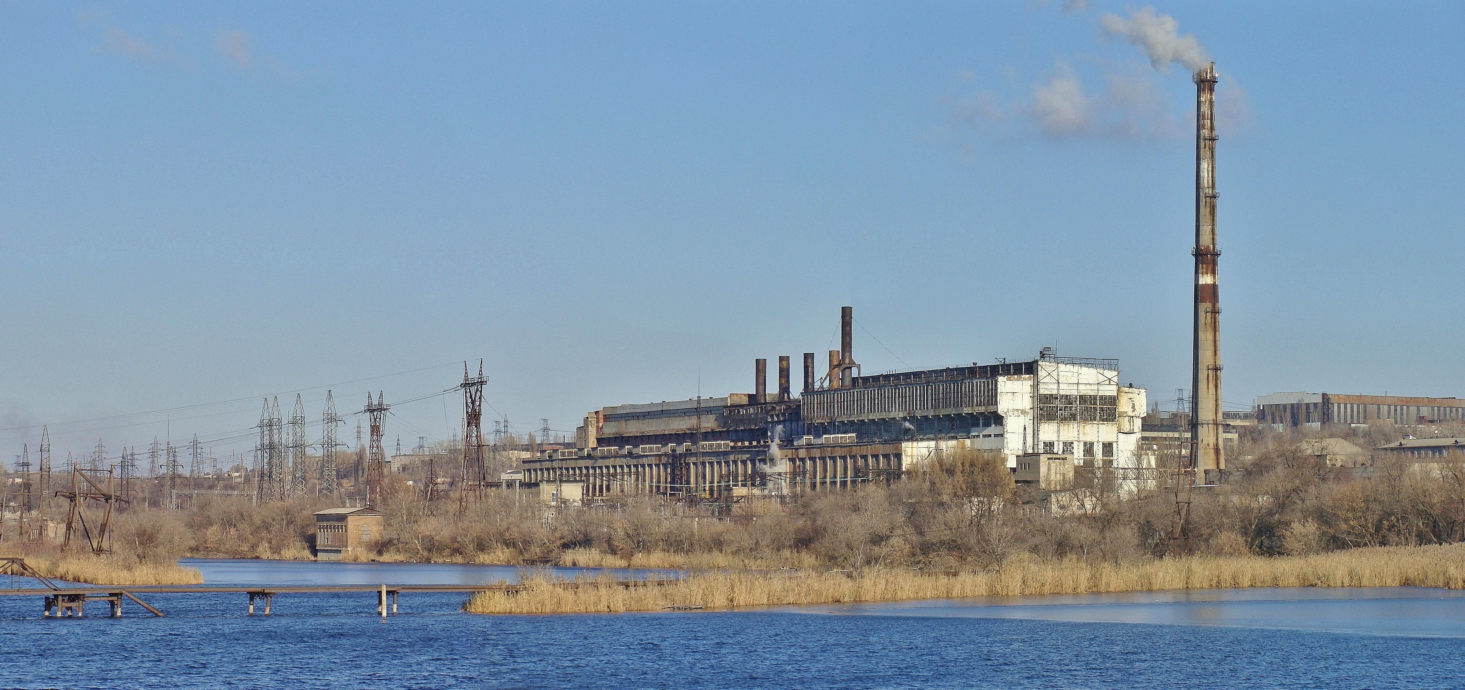 Первенец первых пятилеток индустриализации СССР.